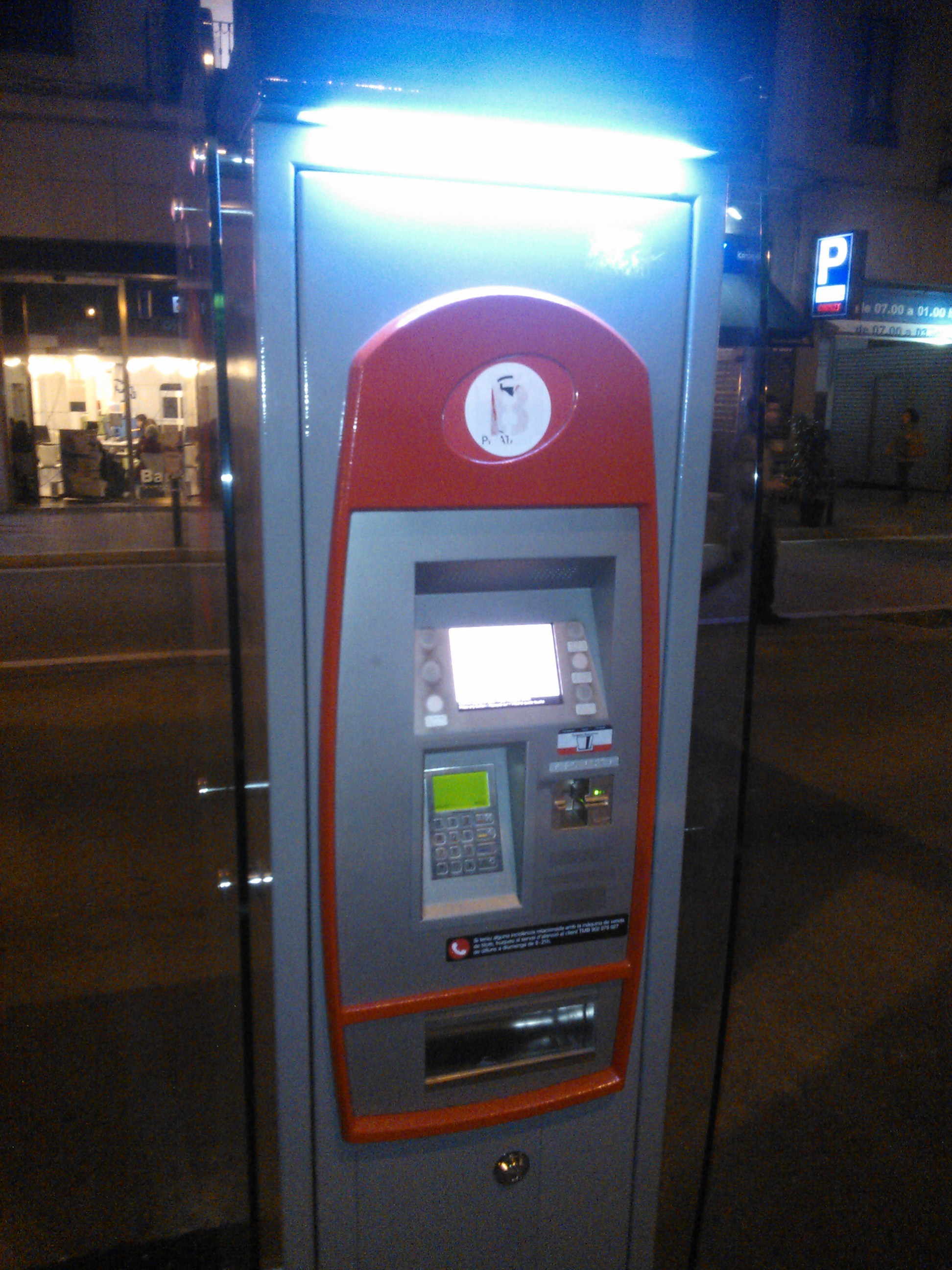 Màquina de venda de bitllets de transport.